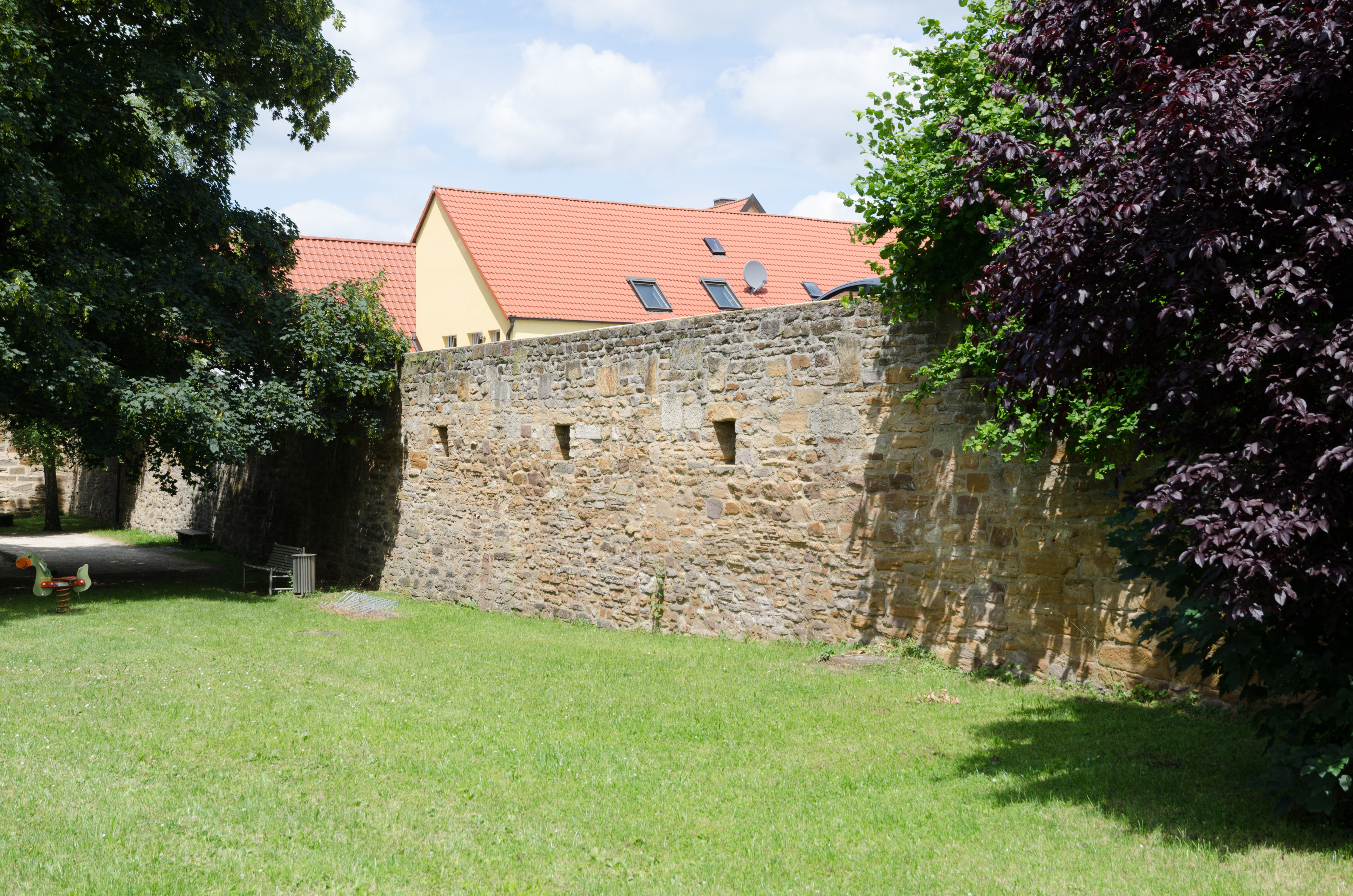 Gerolzhofen, Stadtmauer, Bahnhofstraße 18